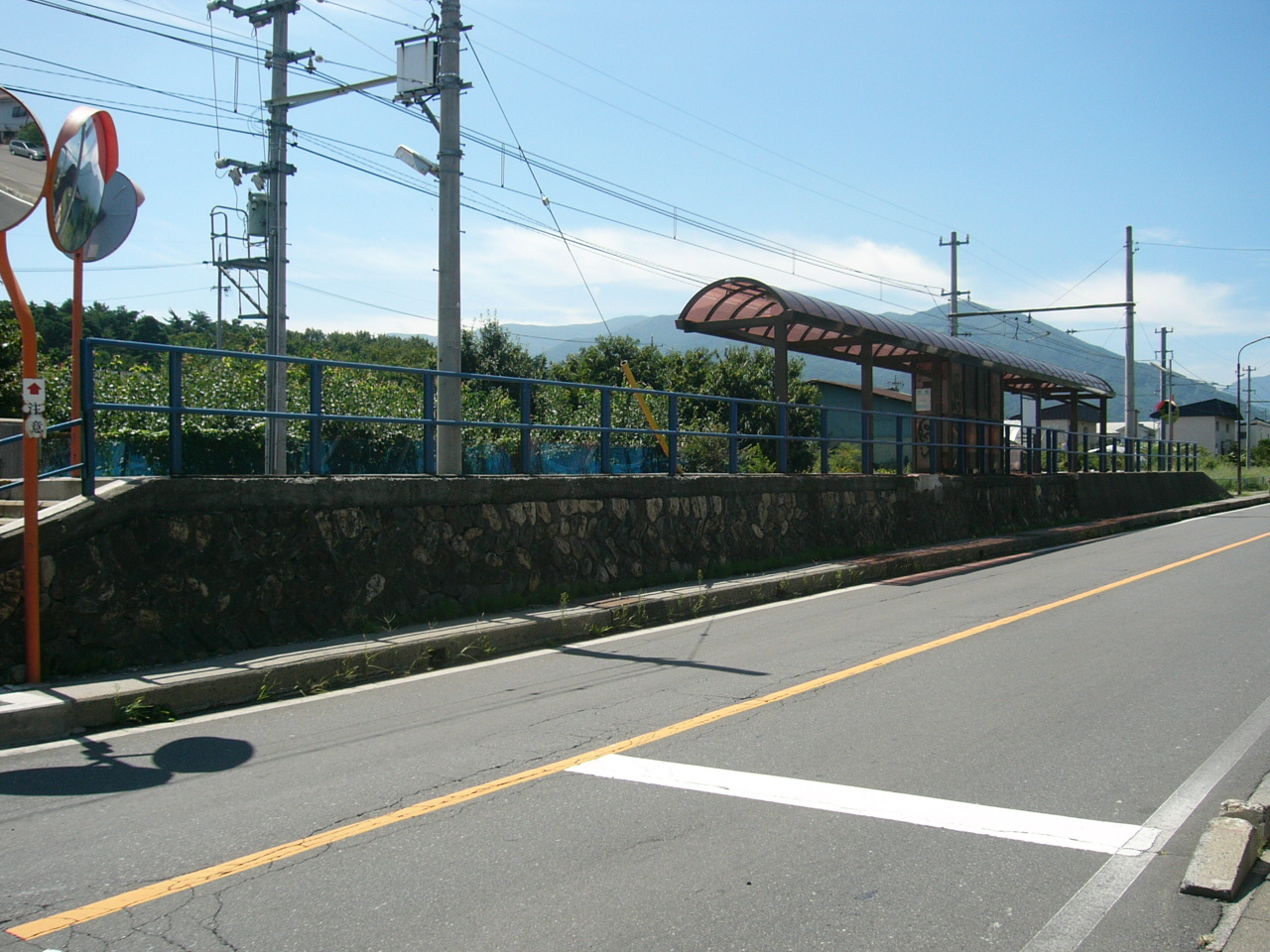 Shimojima Station